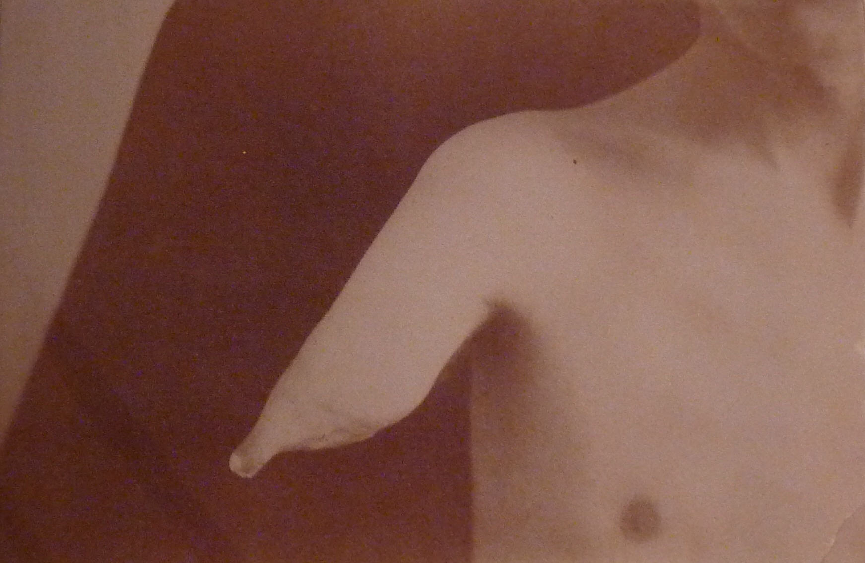 Knochenwachstum nach Amputation in jungen Jahren